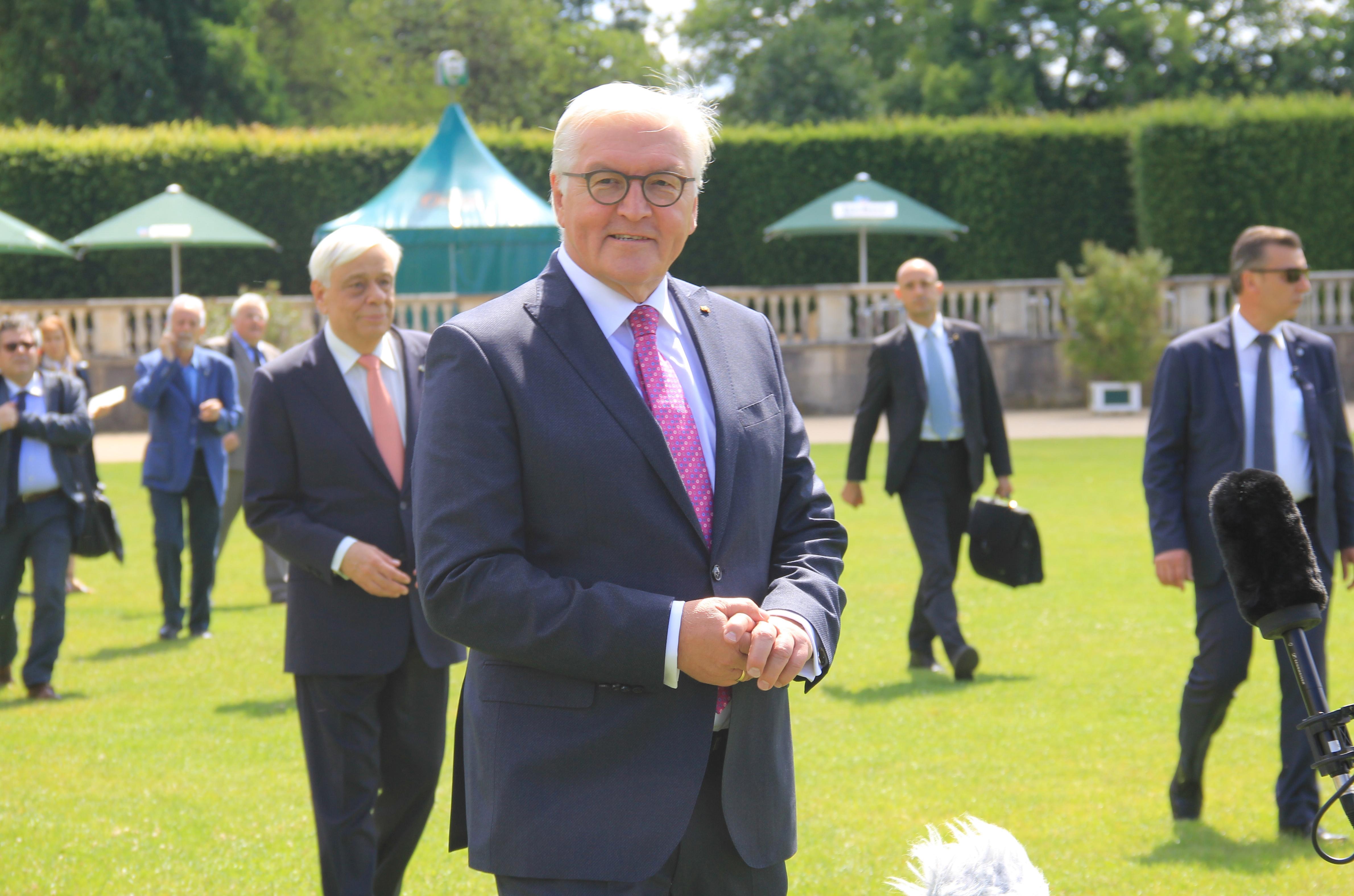 Bundespräsident Frank-Walter Steinmeier (Vordergrund) mit dem griechischen Präsidetnen Prokopis Pavlopoulos bei der Eröffnung der Documenta 14 (2017)